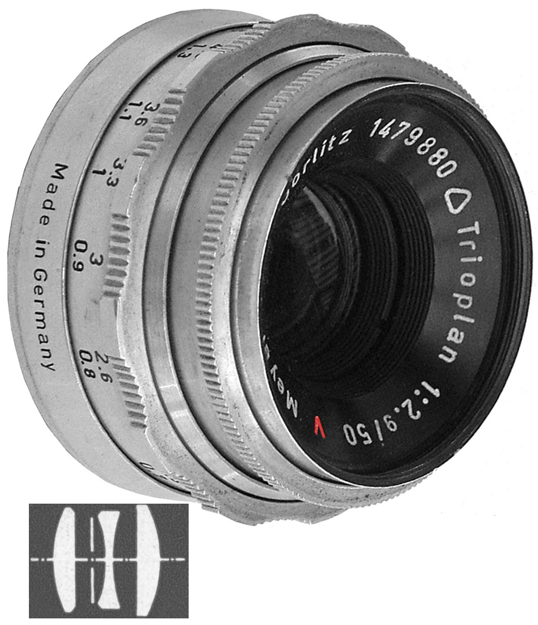 Ein Dreilinser, der in der DDR statt des Tessars verwendet wurde, um einen günstigeren Kamera-Preis zu ermöglichen. Mit den beiden, die ich besitze (Altix und Pentona), bin ich nicht so zufrieden. Eine Unschärfe zum Rand hin ist deutlich erkennbar.